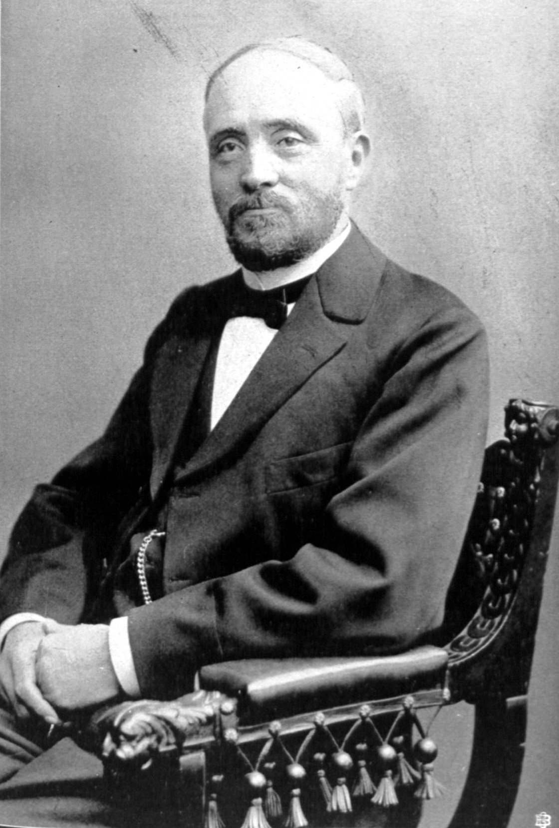 Peter Rehder, Wasserbauingenieur und Oberbaudirektor in Lübeck.